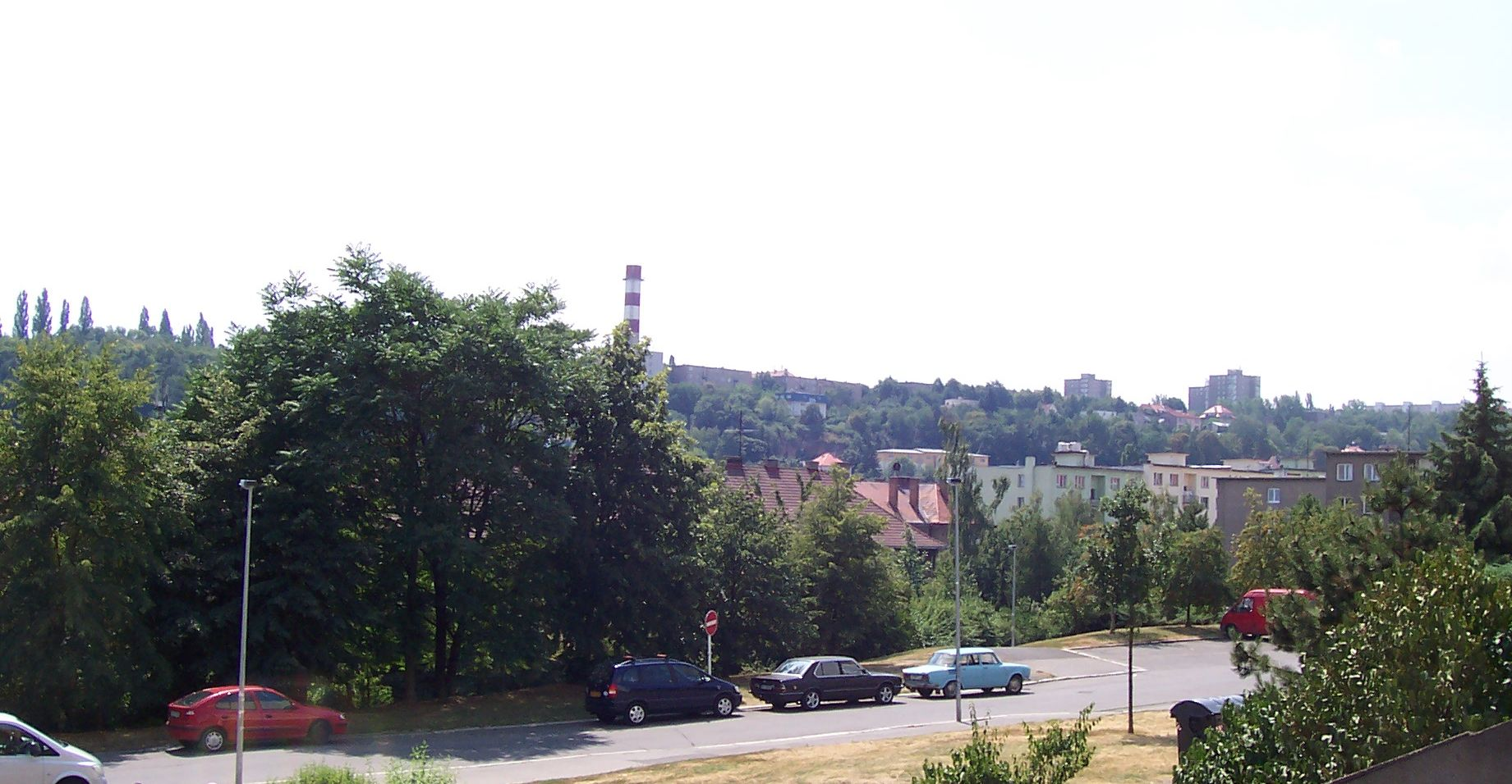 Praha Vokovice